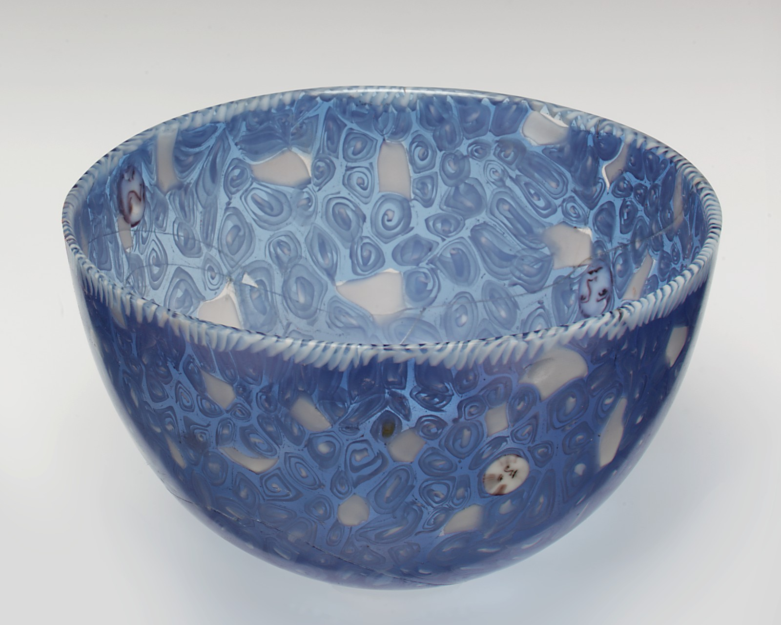 Italian, Venice (Murano); Bowl; Glass